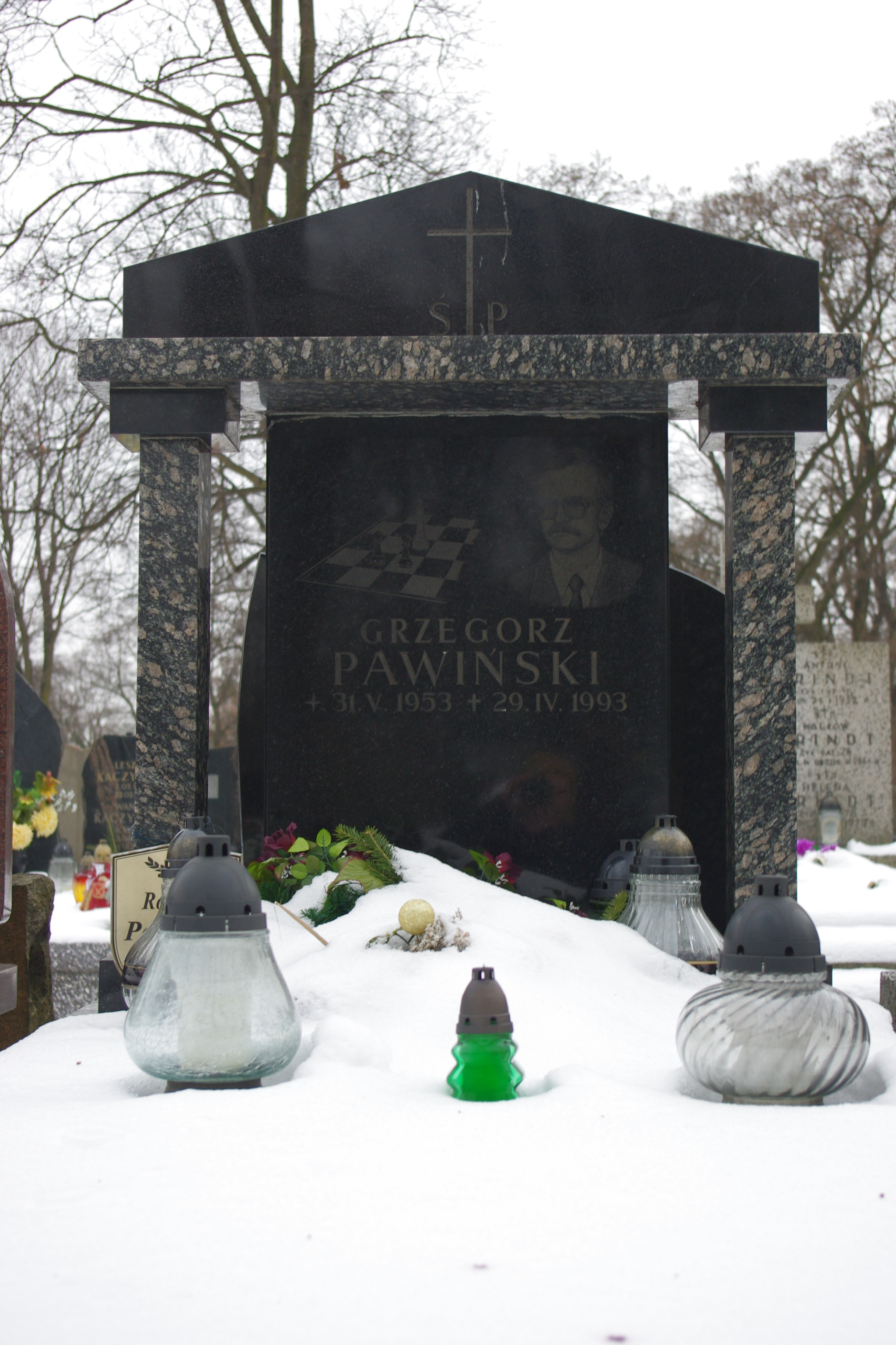 Grób Grzegorza Pawińskiego (1953-1993) – wydawcy i antykwariusza, popularyzatora i pioniera wydawnictwa szachowych w Polsce, twórcy wydawnictwa i księgarni szachowej Caissa w Warszawie. Grób na Cmentarzu Bródnowskim w Warszawie